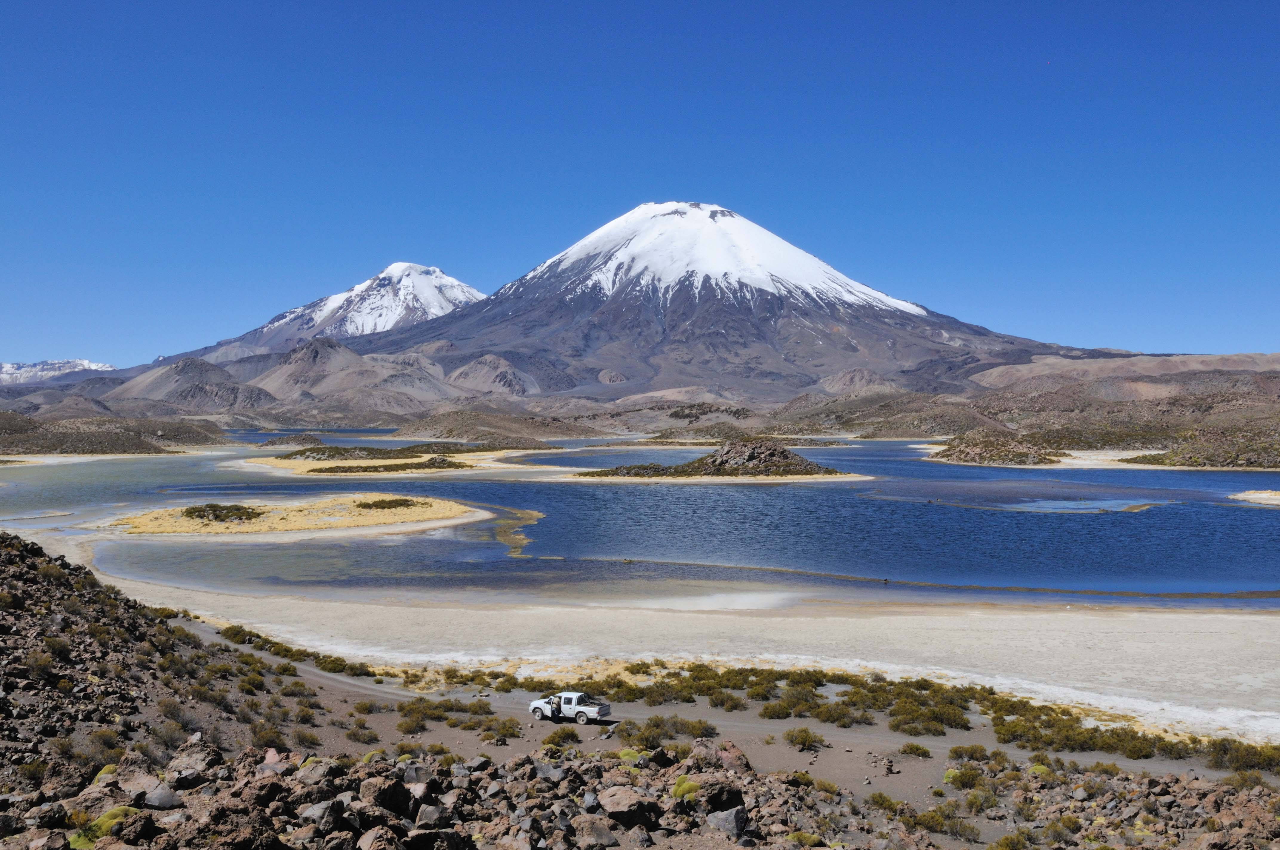 Frontera entre Bolivia y Chile